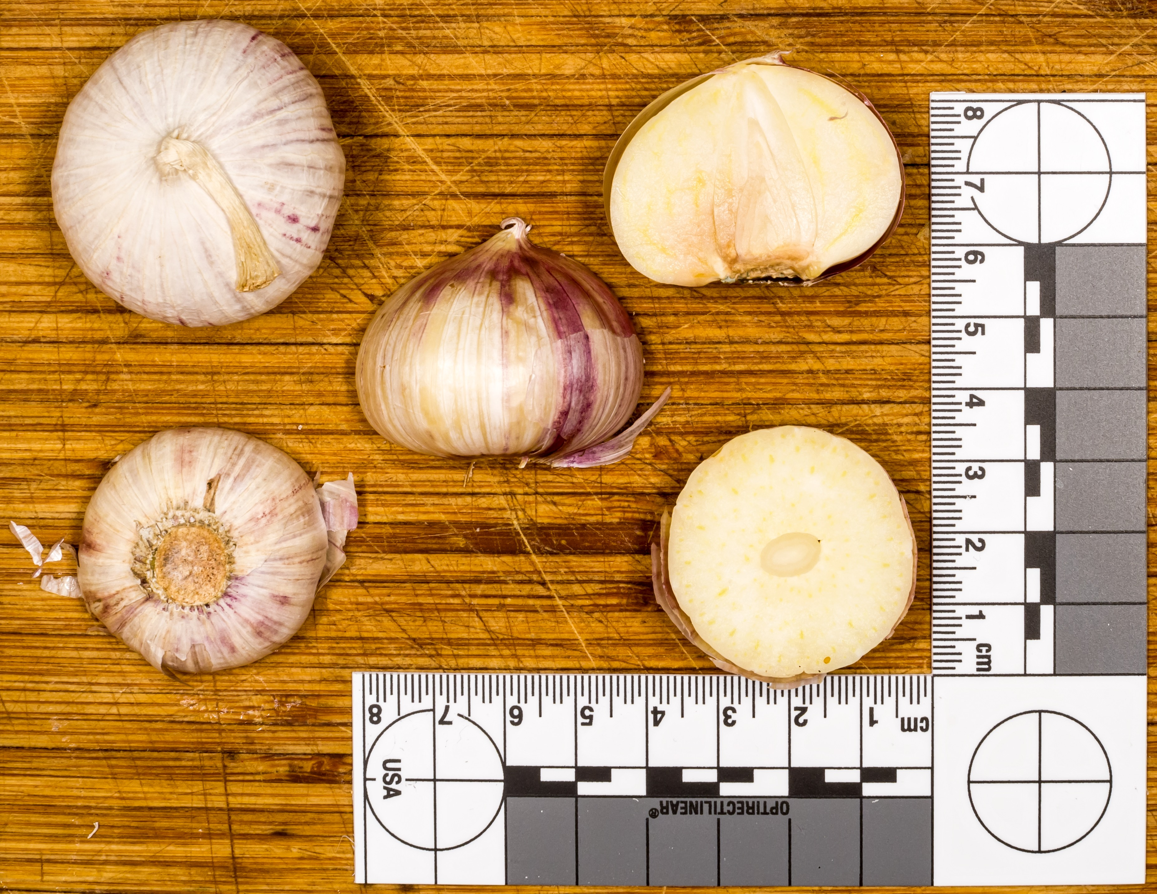 Konoblauch: Solo Garlic